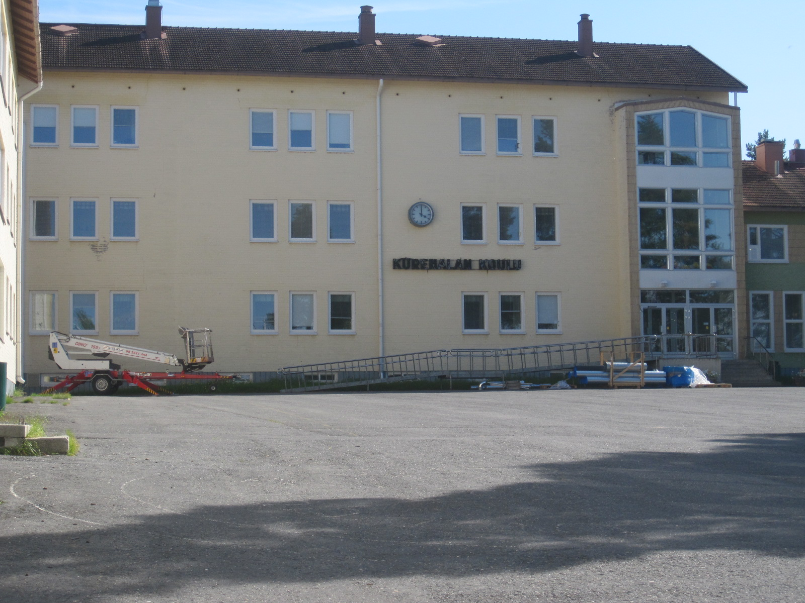 Pudasjärven keskustaajamassa Kurenalla sijaitseva Kurenalan koulu.